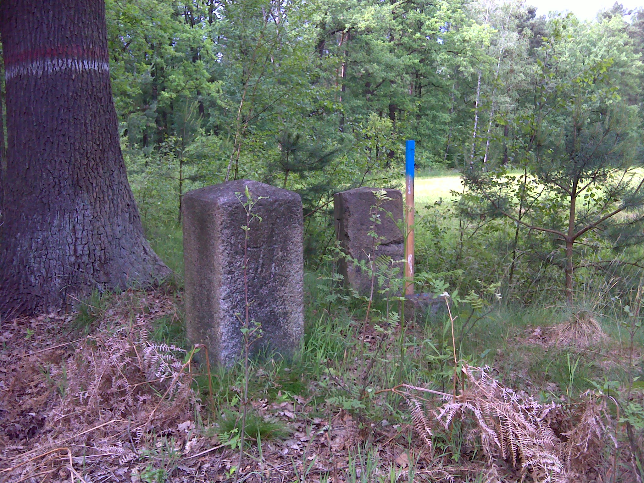 Historischer Grenzstein Nr. 71 der sächsisch-preußischen Grenze 1815 Grenzsteinpaar mit Läuferstein. Links am Baum befindliche rot-weiße Markierung kennzeichnet beispielhaft das ehemalige Sperrgebiet zum Truppenübungsplatz Dauban. Hornjoserbsce: Historiski saksko-pruski měznik čo. 71 blisko Duboho